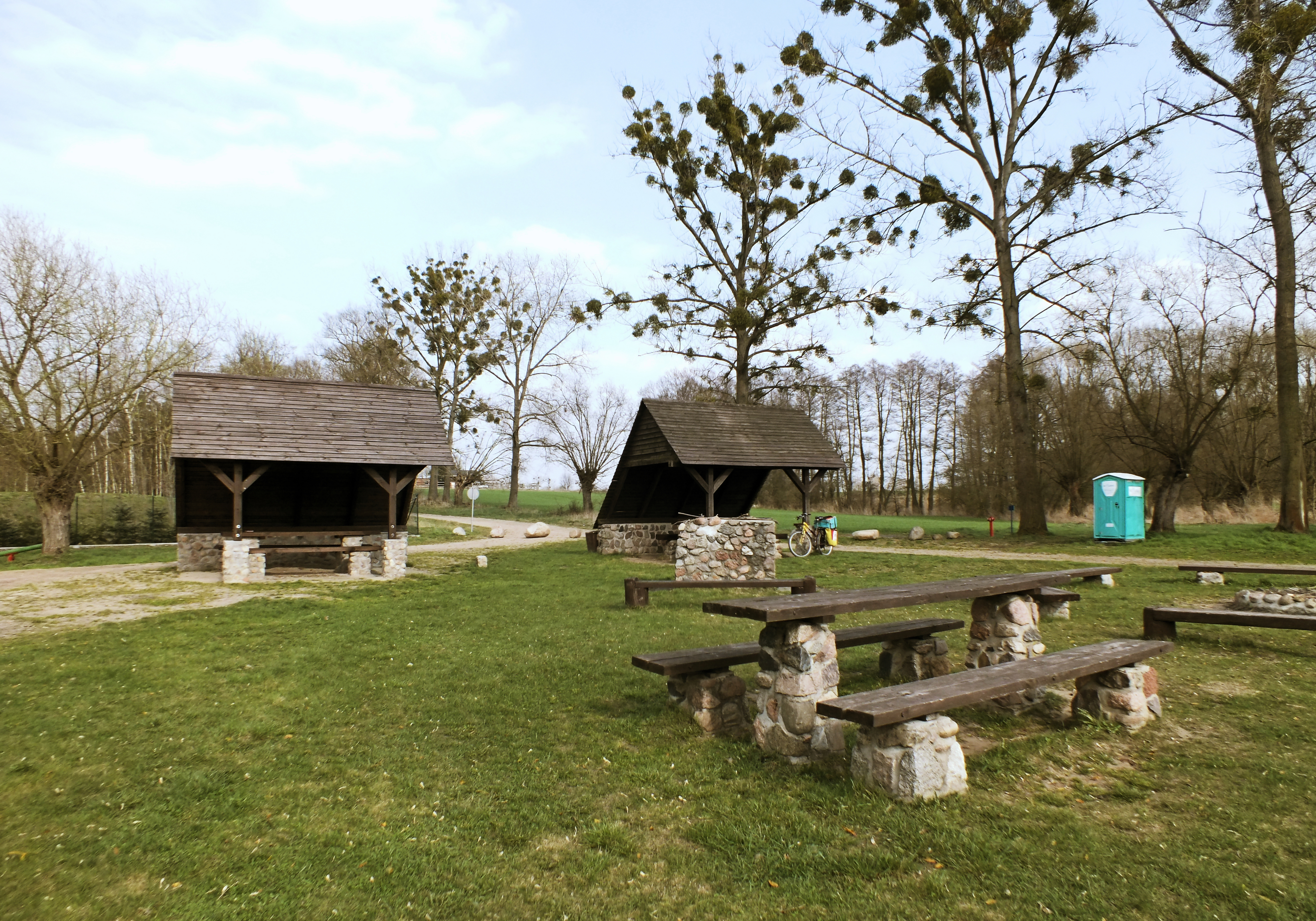 Mściszewo, przystań kajakowo-jachtowa "Binduga"